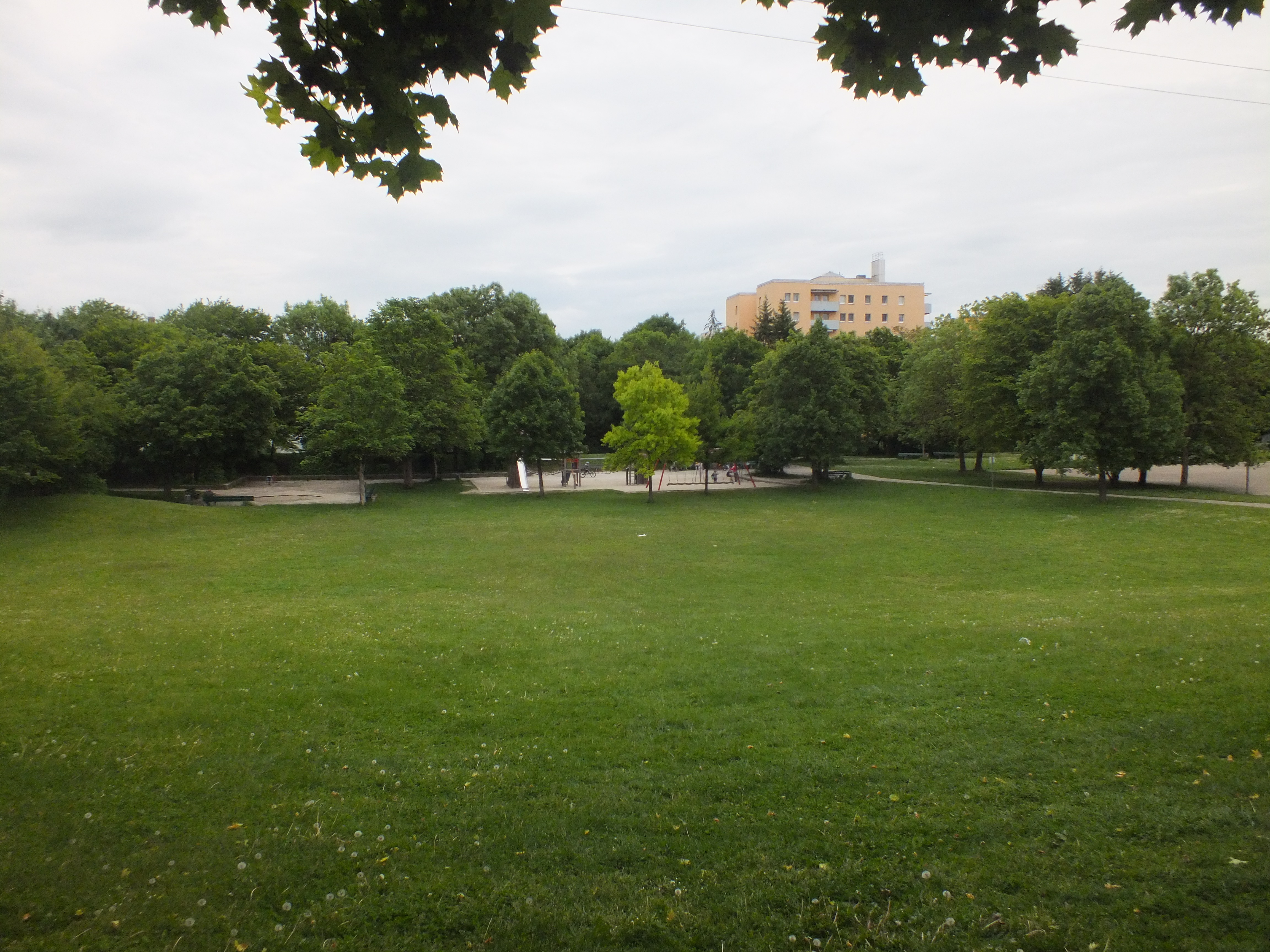 Freizeitpark Feldmochinger Anger